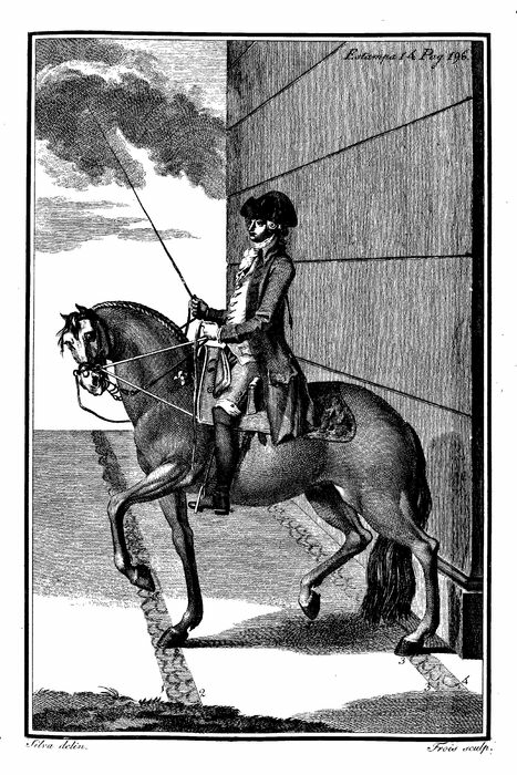 enrênement gravure de "Luz .da liberal e nobre arte da cavallaria" de Manoel Carlos de Andrade (edition1790)